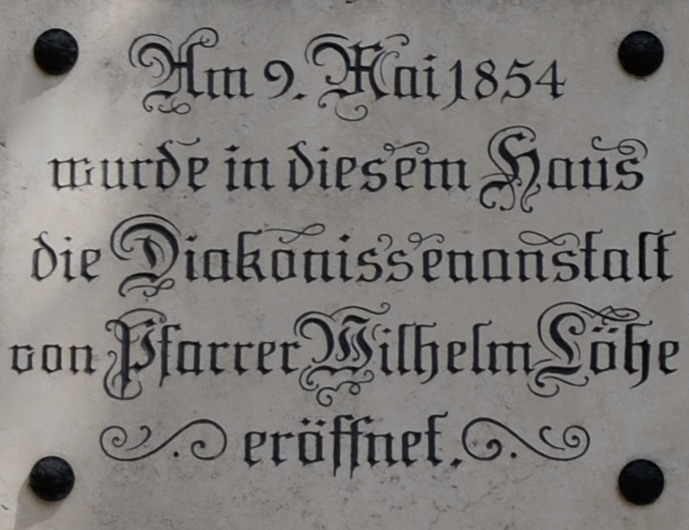 Inschrift am Gasthof "Zur Sonne": Am 9. Mai 1854 wurde in diesem Haus die Diakonissenanstalt von Pfarrer Wilhelm Löhe eröffnet.